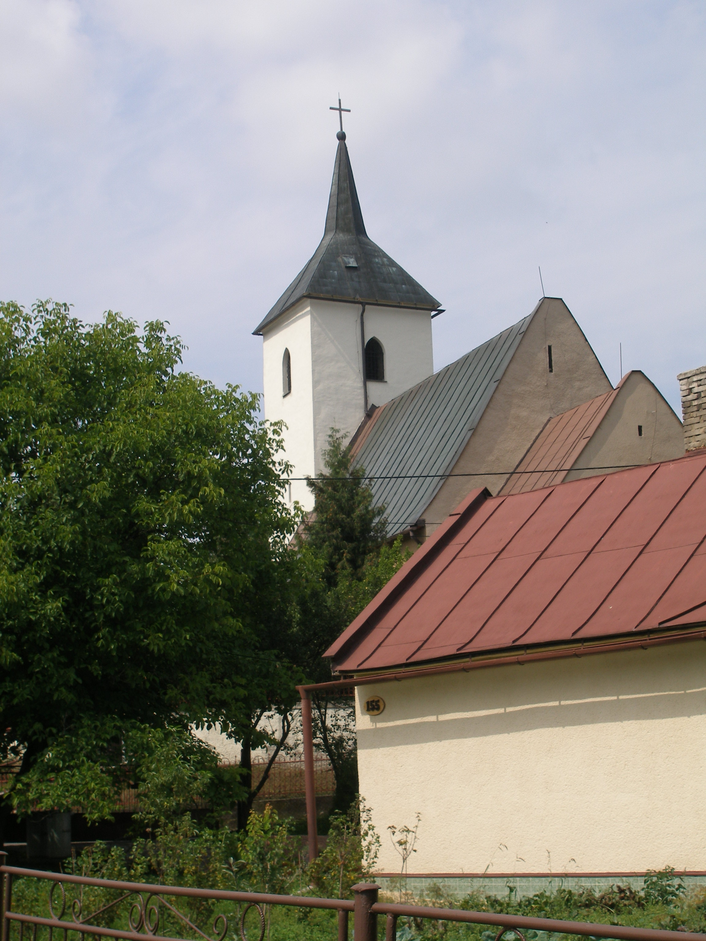 Šarišská obec Hrabkov This medium shows the protected monument with the number 707-10700/0 in the Slovak Republic.